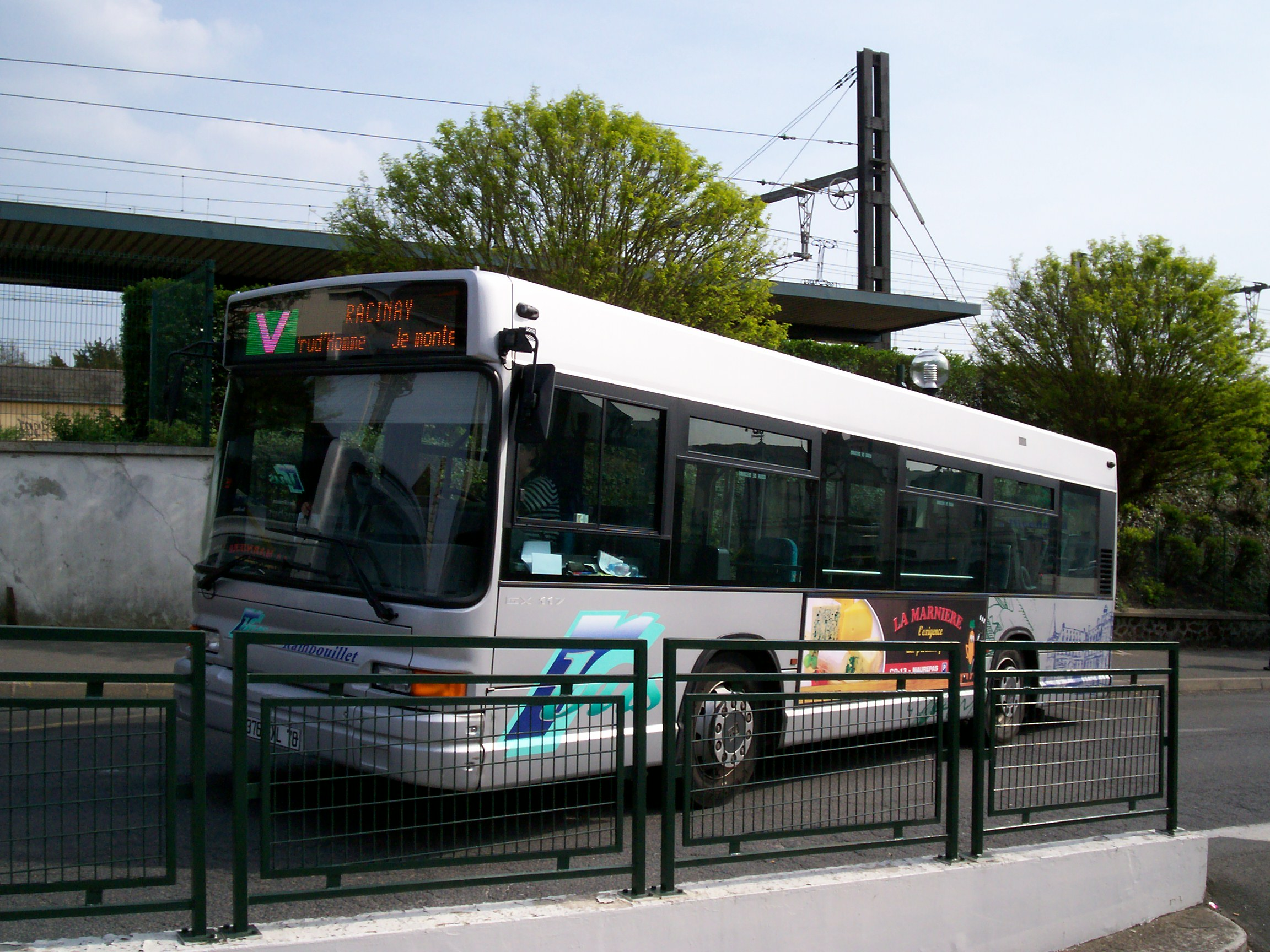 Un bus du réseau R bus